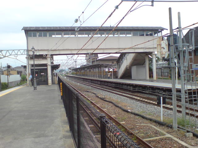 嵯峨嵐山駅ホーム 嵯峨嵐山駅ホーム